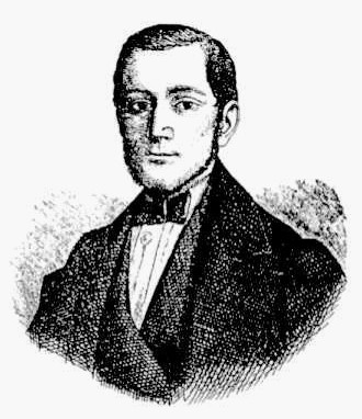 František Alexandr Heber (1815 - 1949), Pražský kupec a amatérský historik.